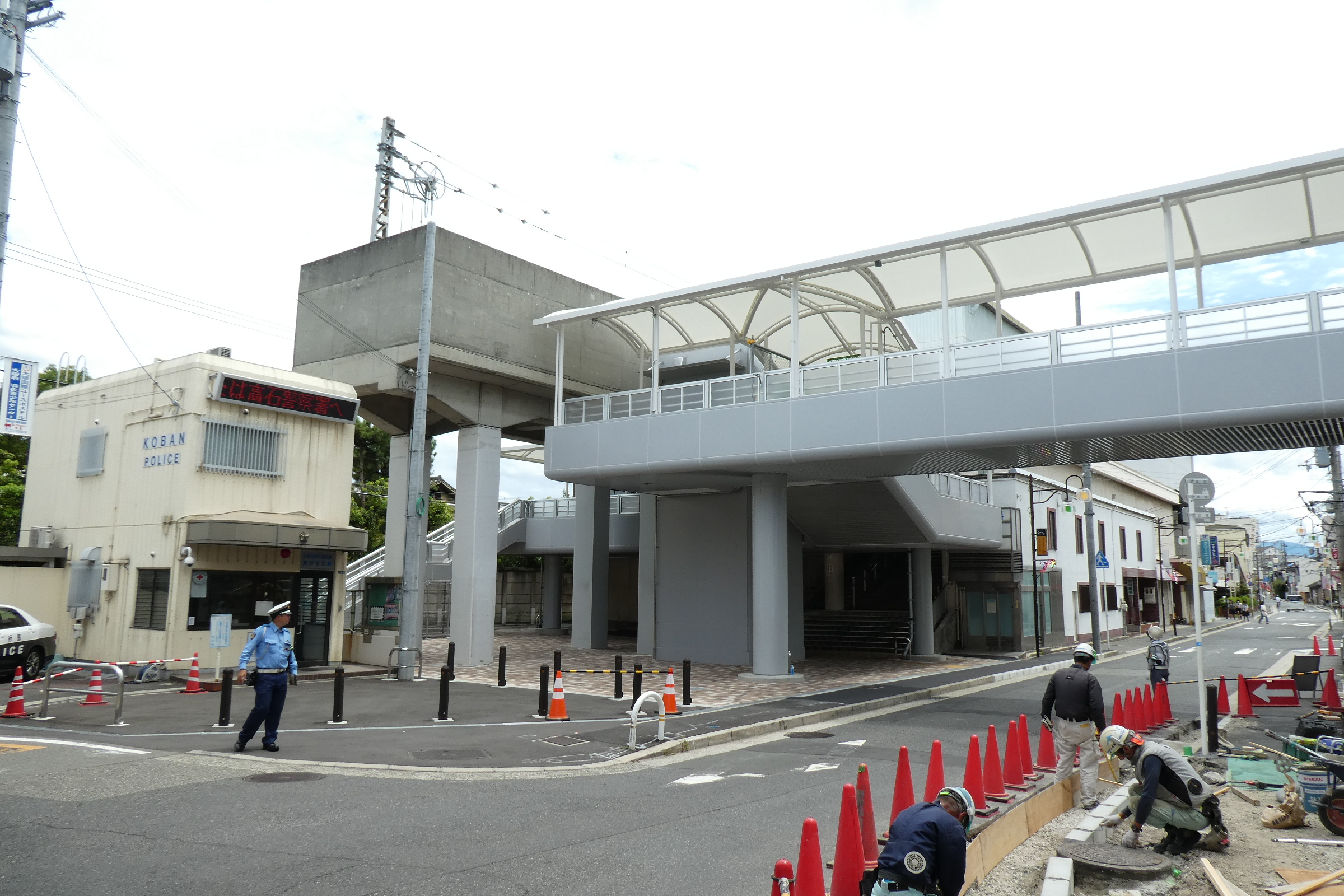 JR阪和線 東羽衣駅。